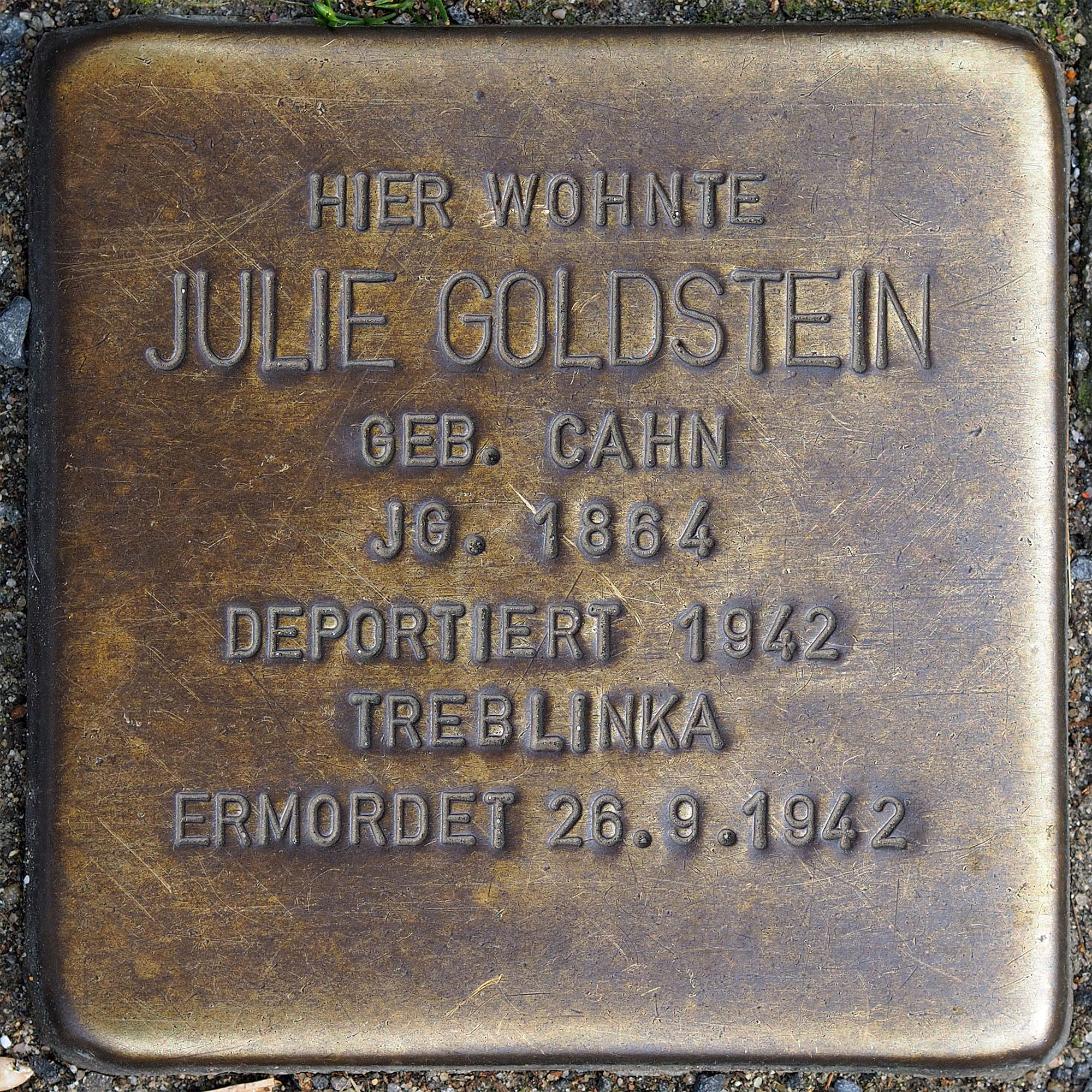 Stolpersteine GV: Goldstein, Julie